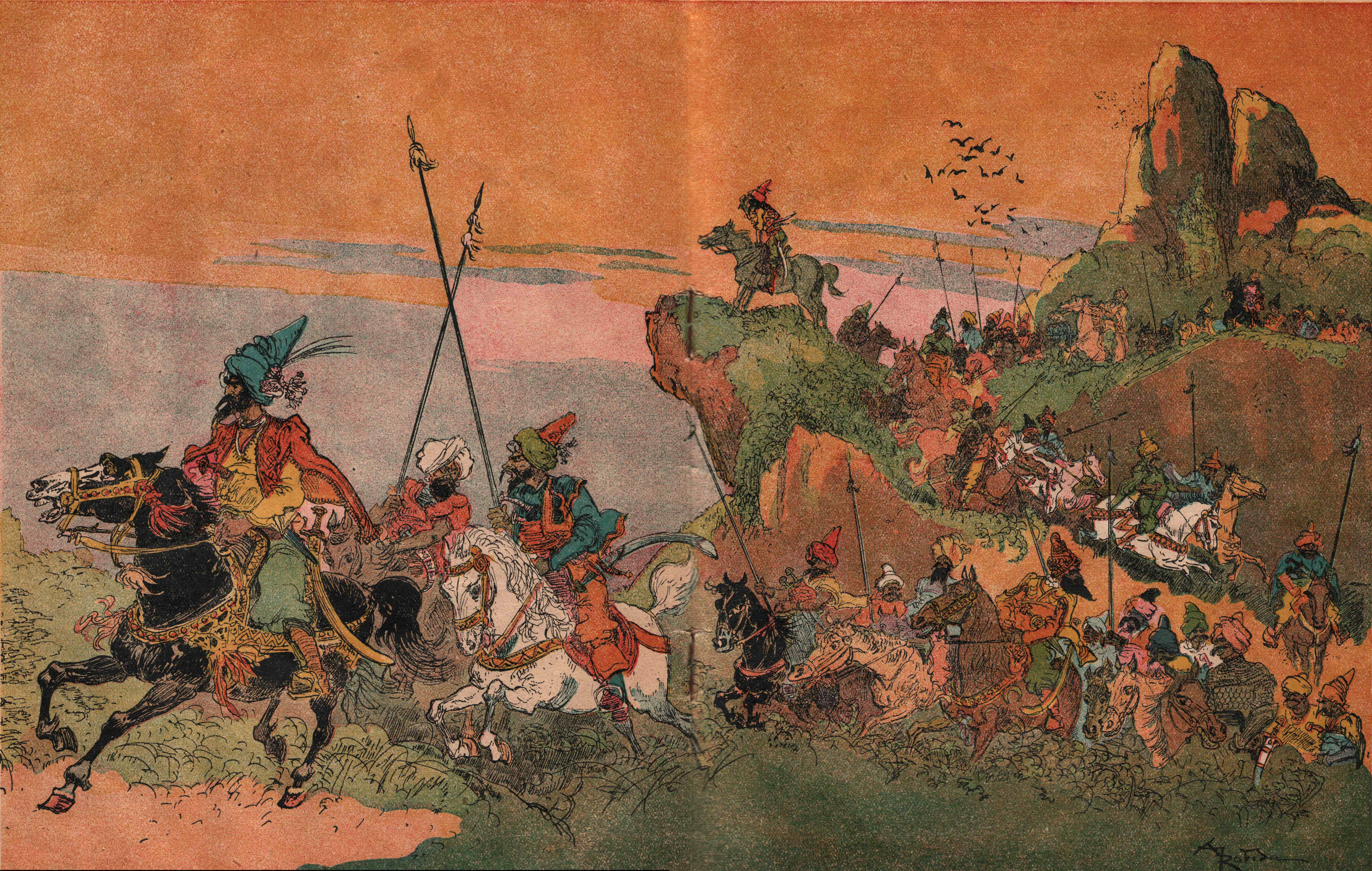 Illustration par Albert Robidat d'Albi-Baba et les quarante voleurs - double page (8 et 9)